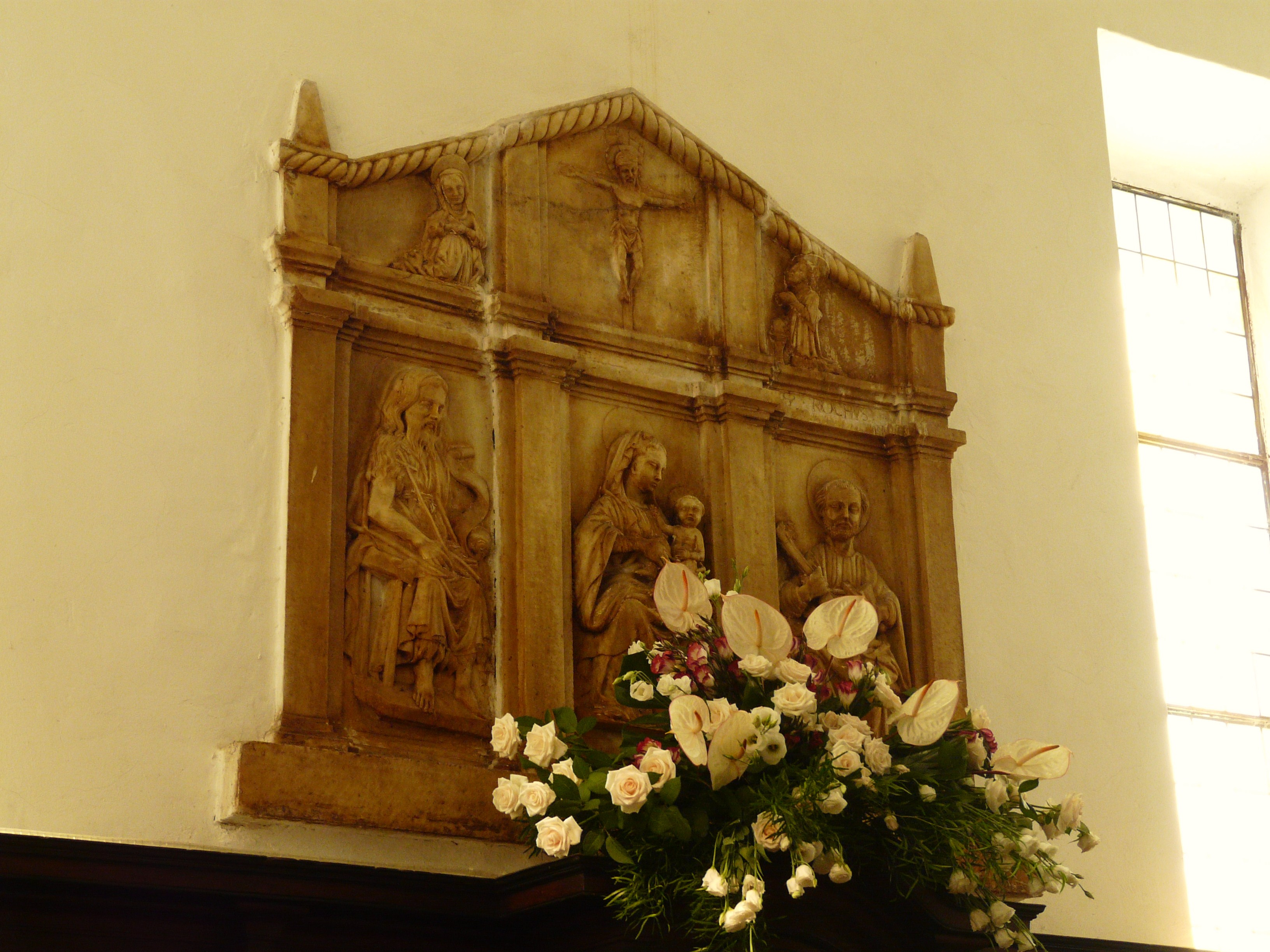 Trittico presso l'altare maggiore della pieve dei Santi Stefano e Margherita di Baccano, Arcola, Liguria, Italia